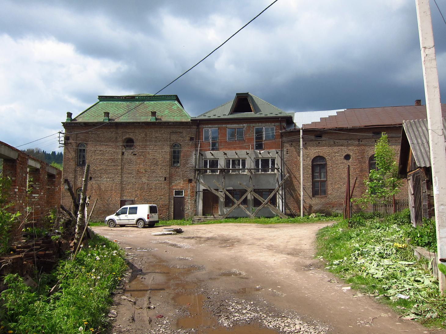 Бывшая синагога в Турке, XIX в.